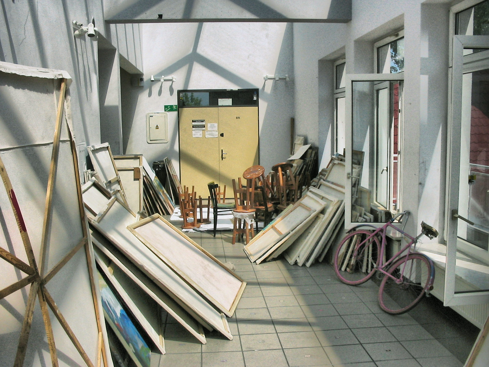 Wnętrze budynku Katedry Sztuki i Kultury Plastycznej UZ, Zielona Góra